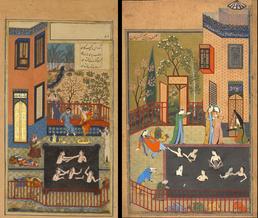 Vorbild und Nachahmung Ein Szene aus Nezāmis Khamsa: links von einem unbekannten Herater Maler um 1462, rechts von Behzād um 1495